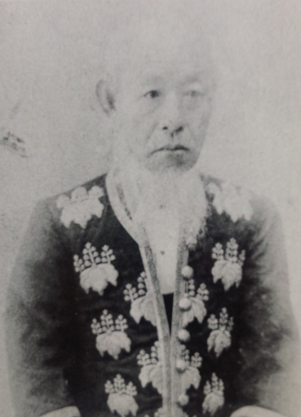 柳沢光昭の肖像写真。